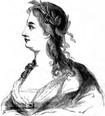 Ritratto a stampa di Maria Maddalena Morelli pubblicato su Sarah Josepha Hale, Woman's Record, New York, 1853